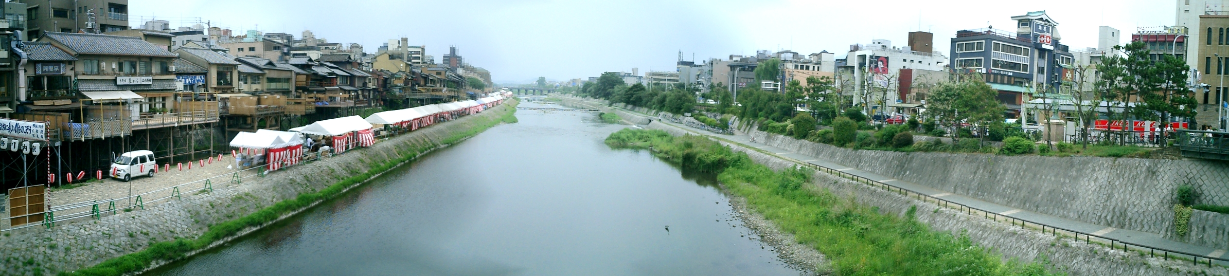 Kamo River